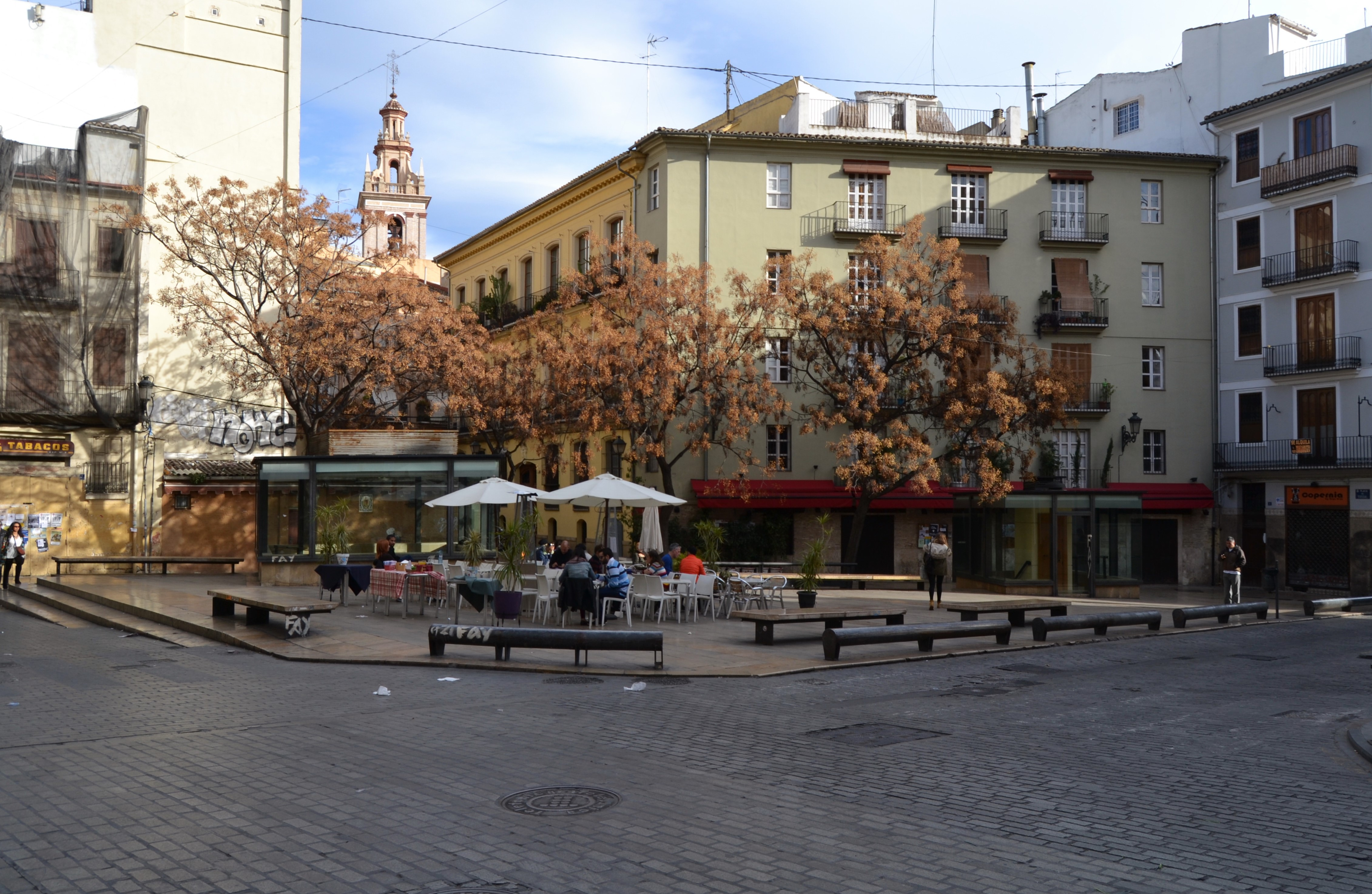 València, plaça del Tossal.